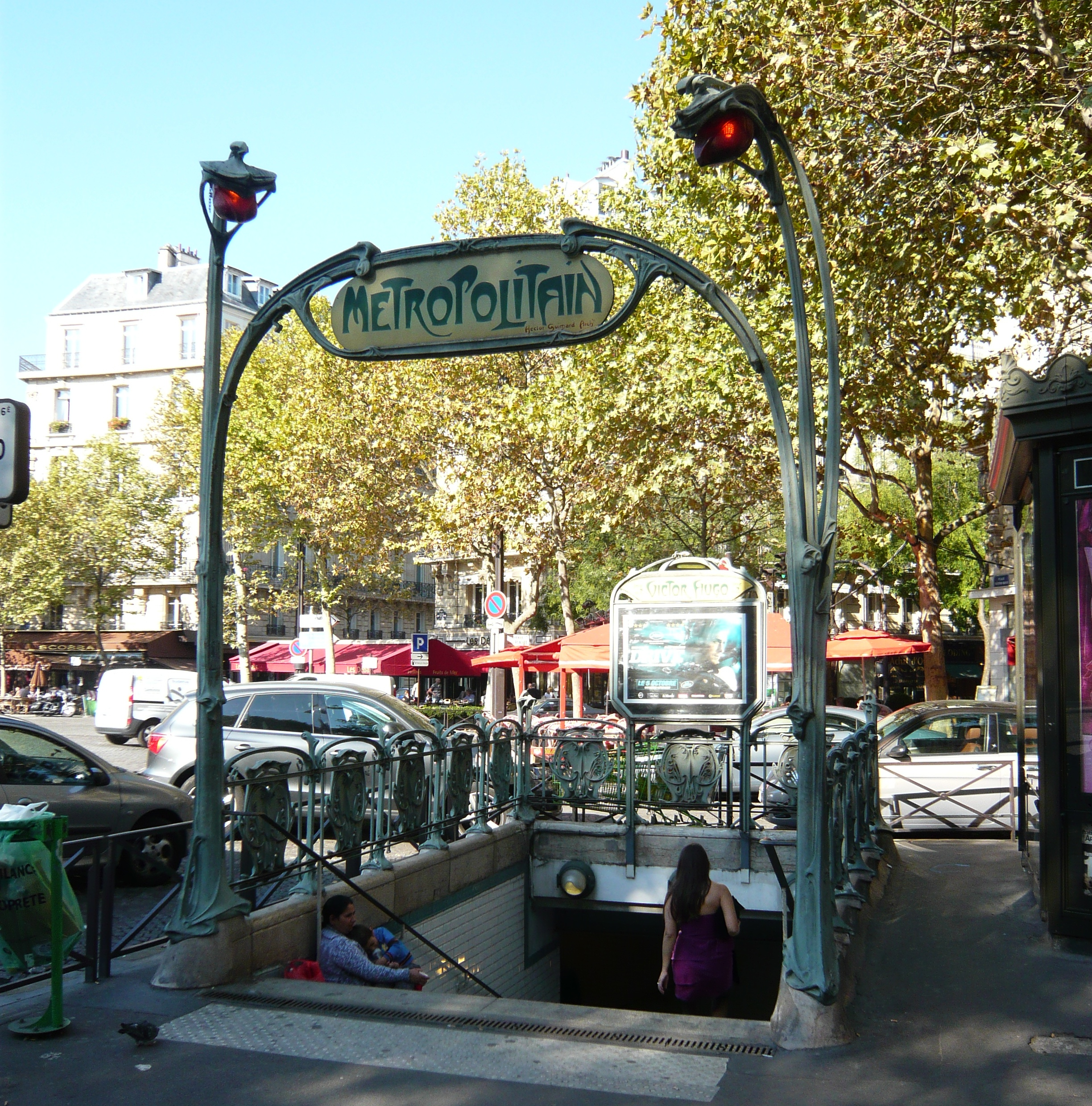 Édicule Guimard Station Victor Hugo .